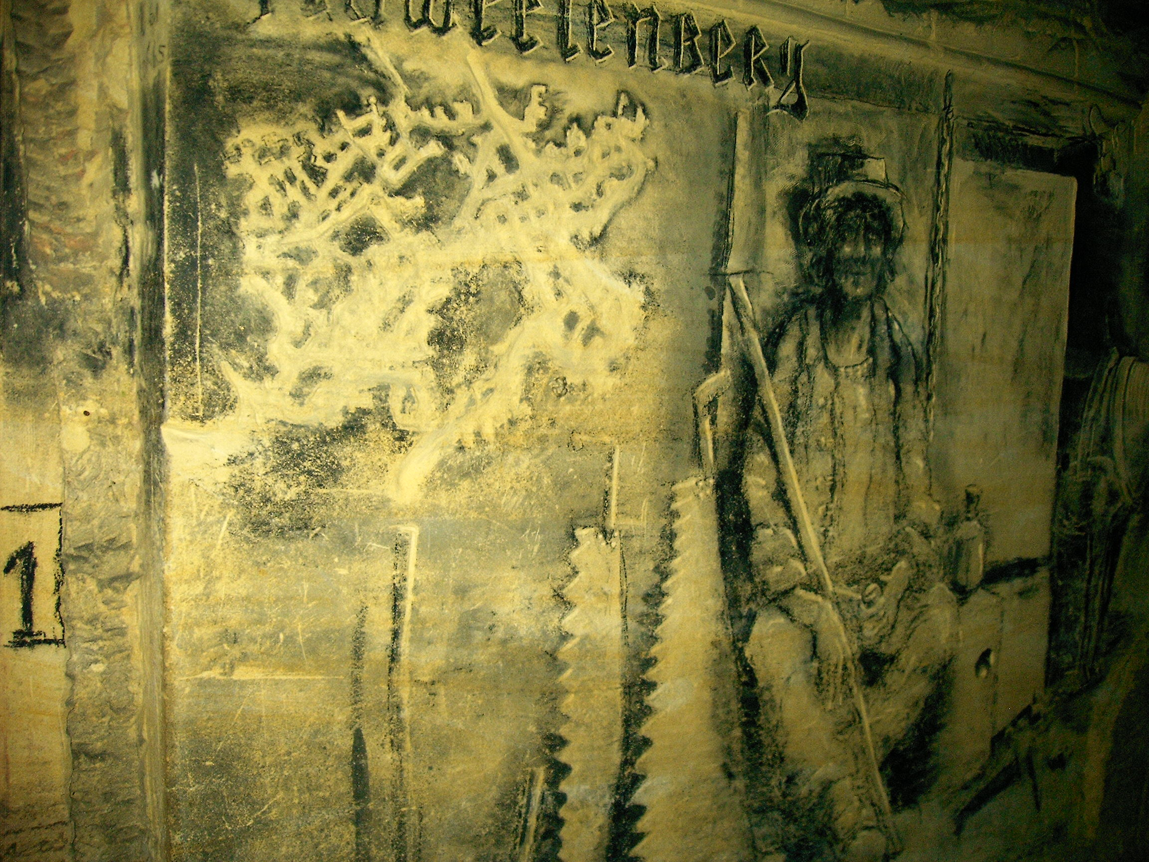 Fluweelengrot:Tekening bij ingang van de grot